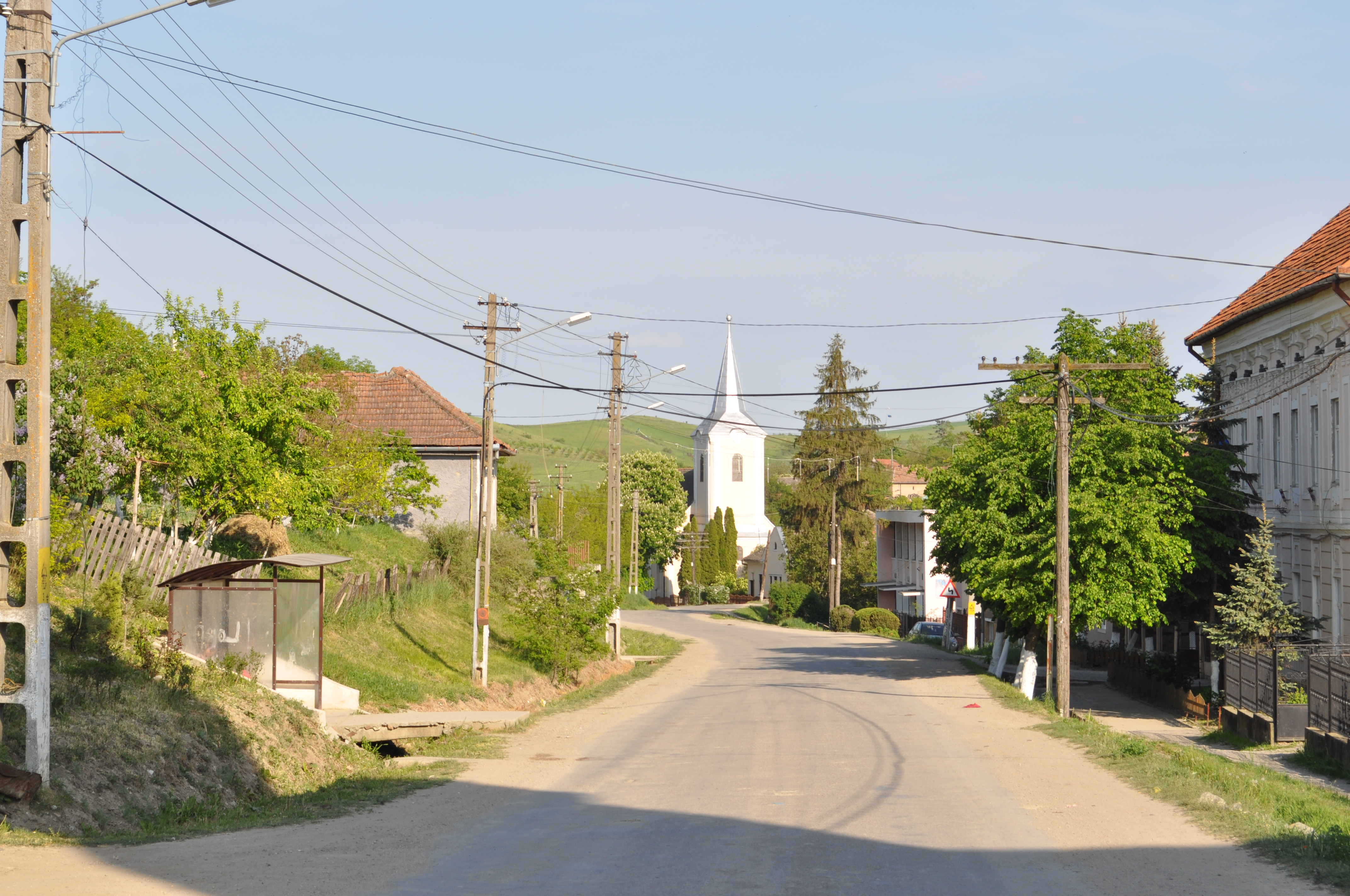 Cojocna, județul Cluj